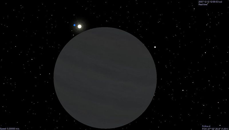 Upsilon Andromedae d es un planeta extrasolar situado a unos 44 años luz de la Tierra, en la constelación de Andrómeda.